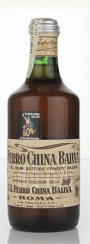 bottihglia